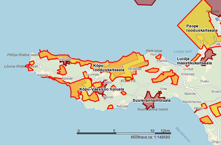 Kõpu poolsaare kaitsealad Maa-ameti kaardil.